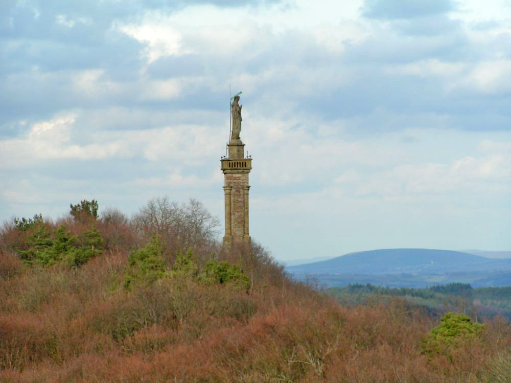 Mariesail zu Tréier.